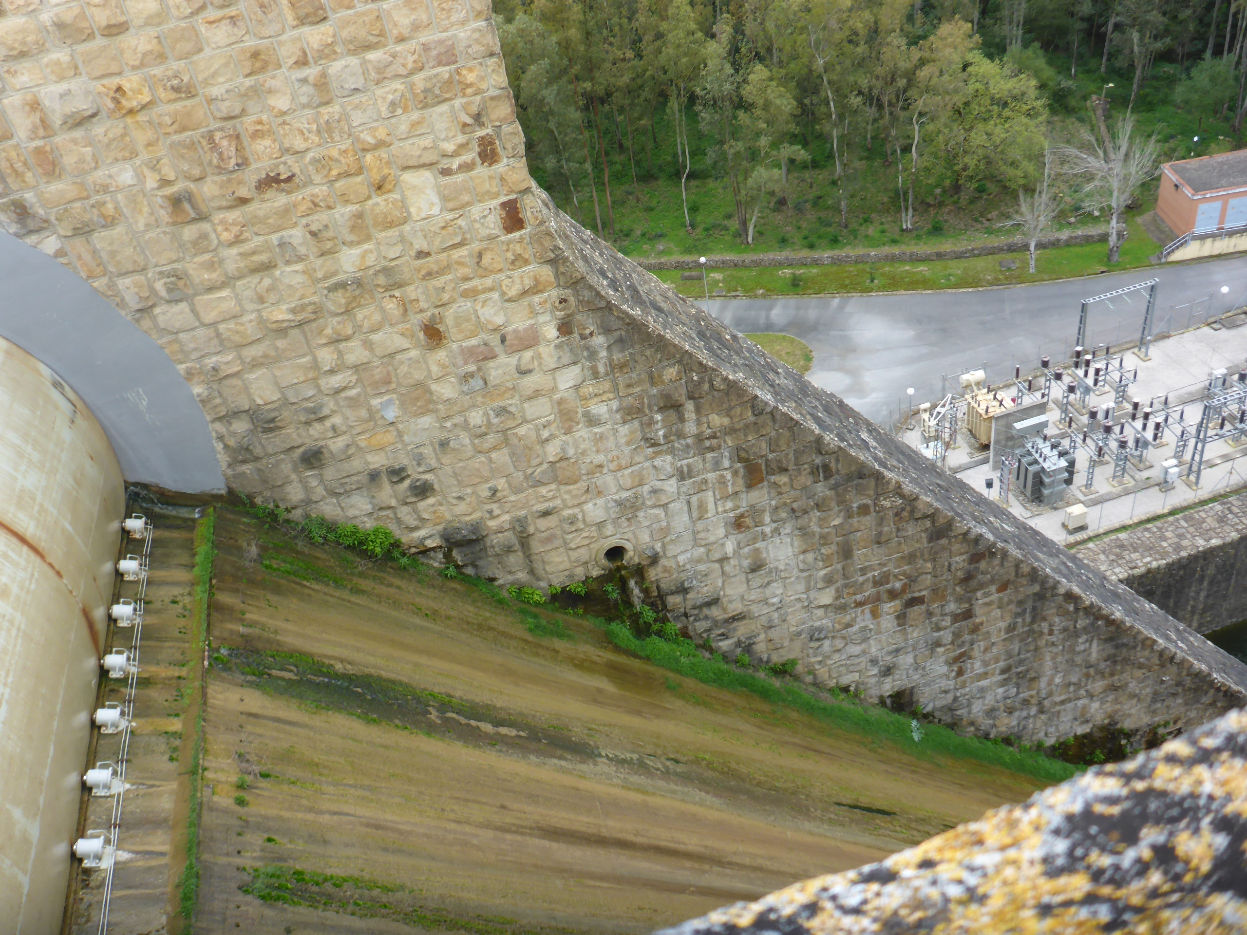 Poblado y Pantano de Los Hurones (provincia de Cádia, España)